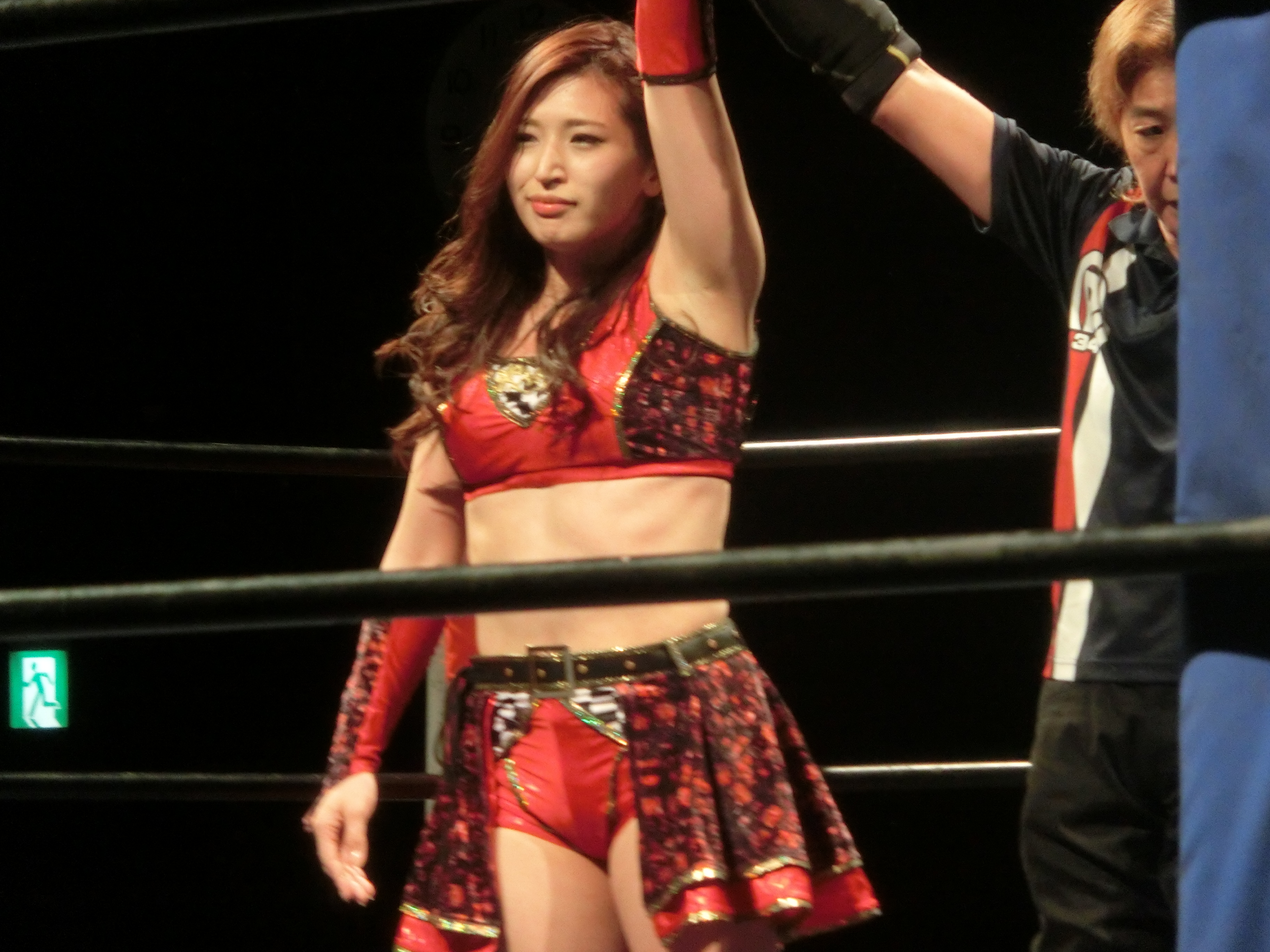 beginning